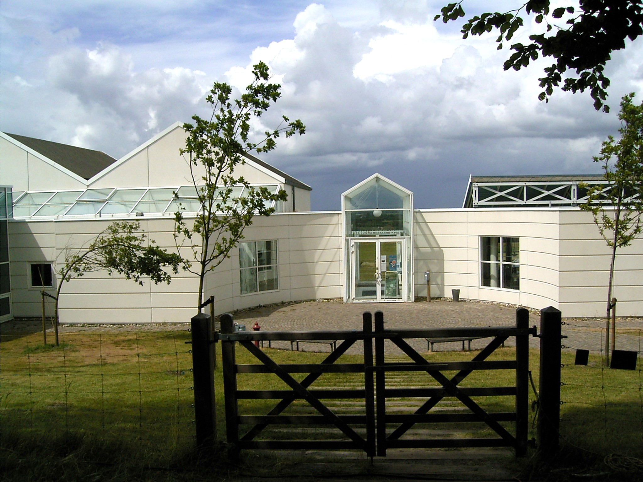 Museum of Lindholm Høje, Aalborg, Denmark